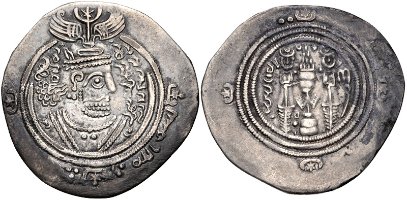 Dracma sassânida reutilizado pelo califa Abdal Malique para sua cunhagem.